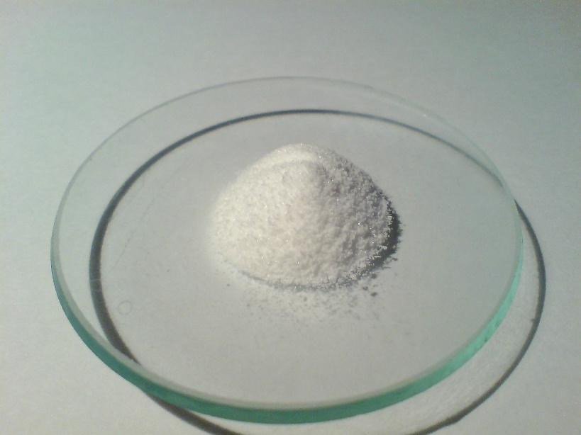 HMTD auf Uhrglasschälchen